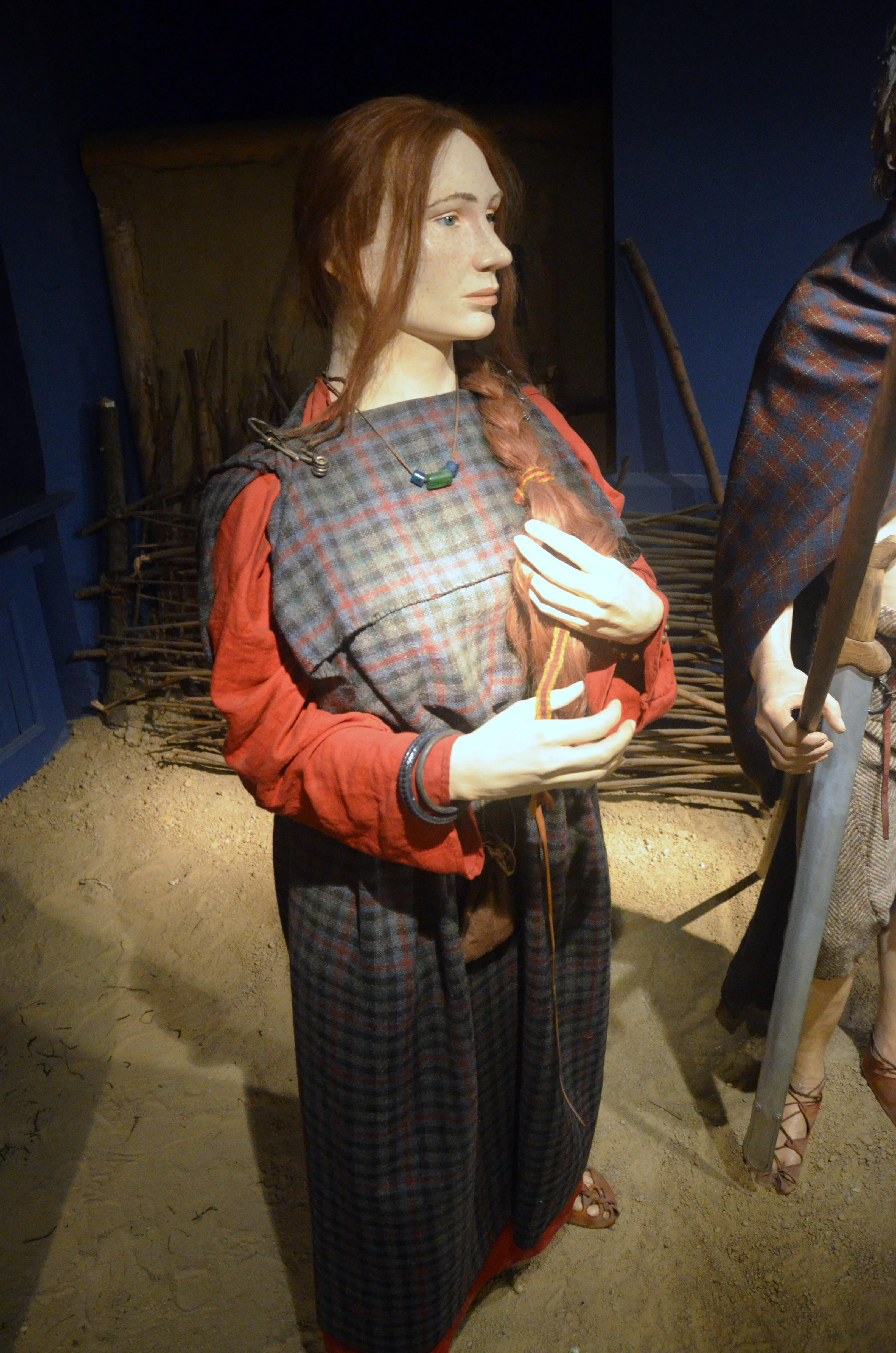 Kleidung der Kelten in Südpolen im 3.Jh. v. Chr.